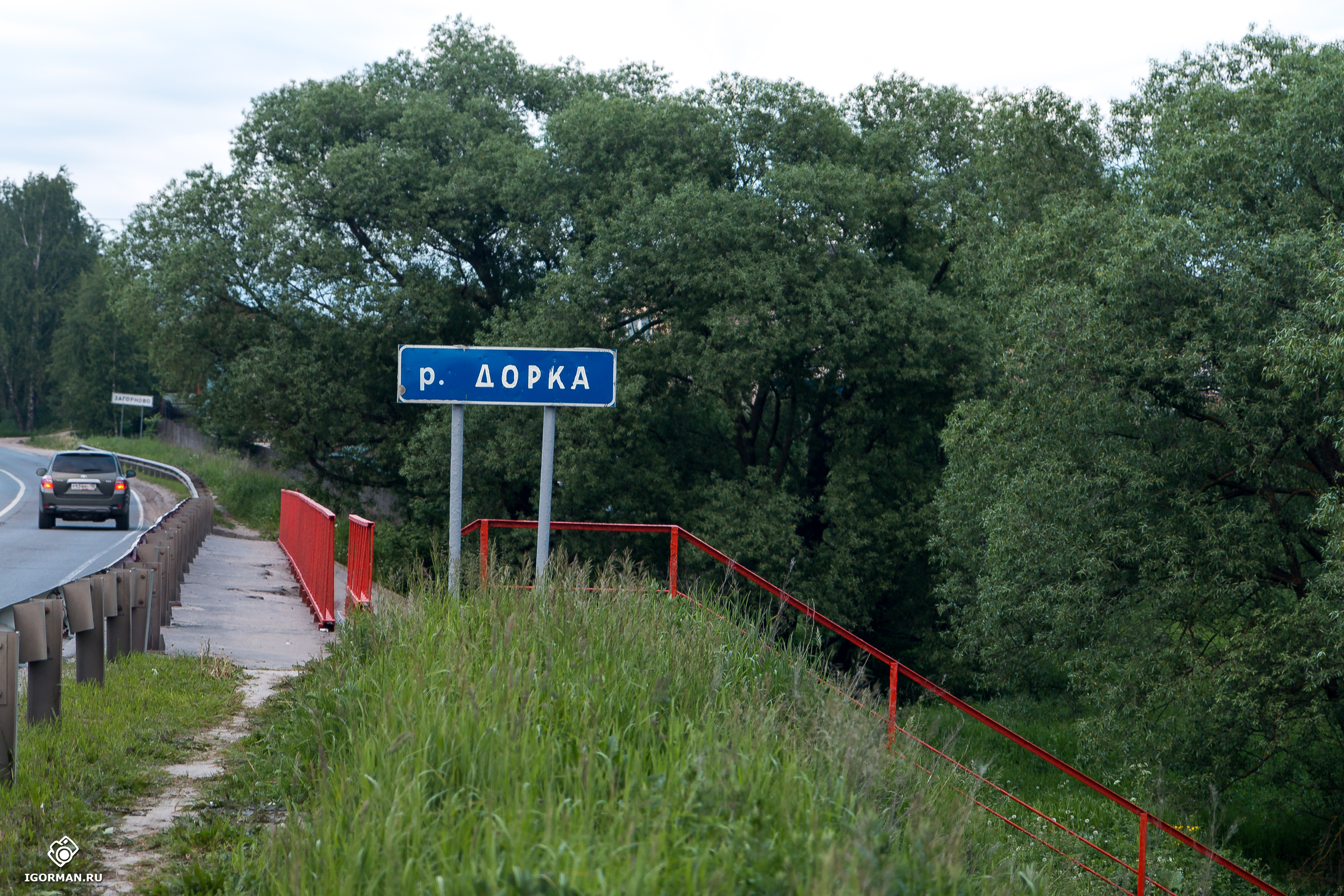 Река Дорка — река в Московской области (Раменский район), левый приток Гжелки. Спуск к реке в районе с.Загороново